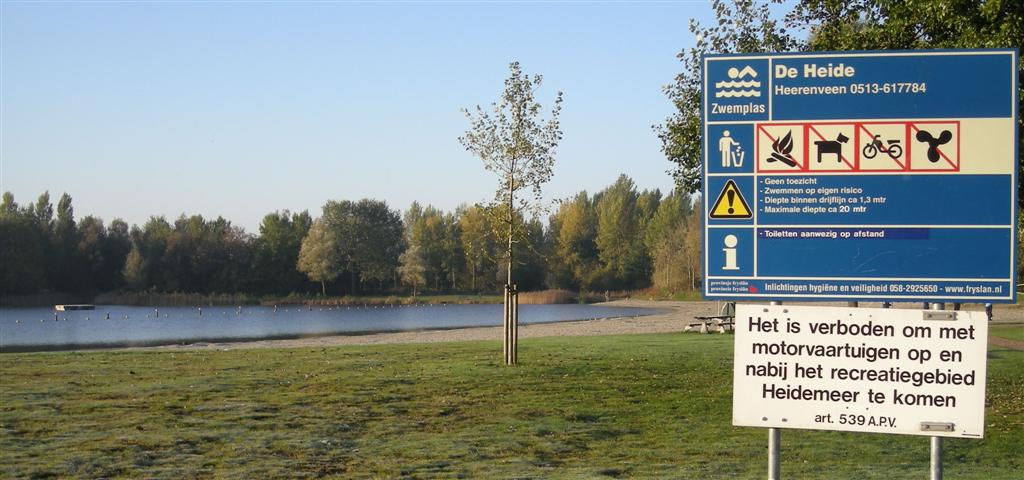 Recreatiegebied De Heide bij Heerenveen